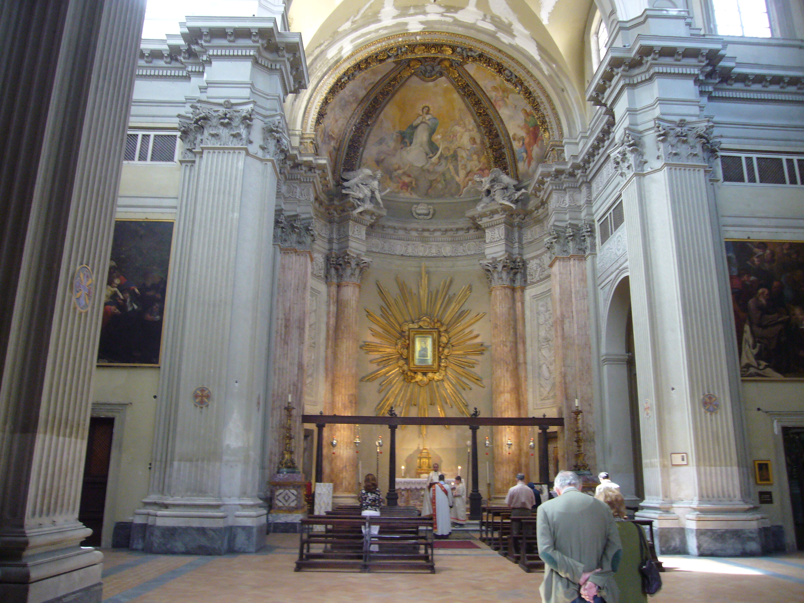 Roma, s. Maria in Campo Marzio, abside